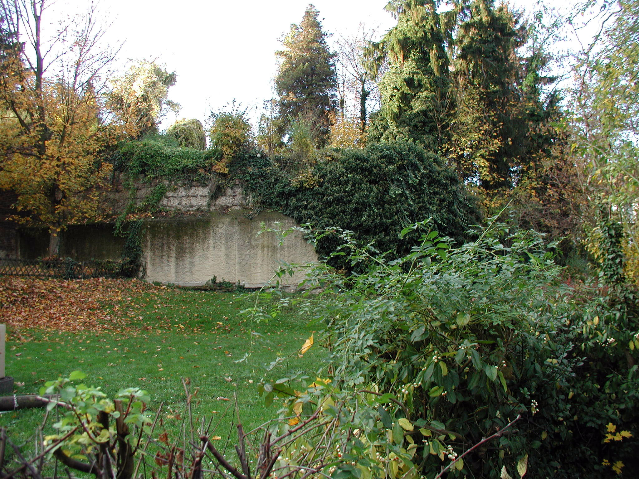 Burgruine Hürth-Fischenich